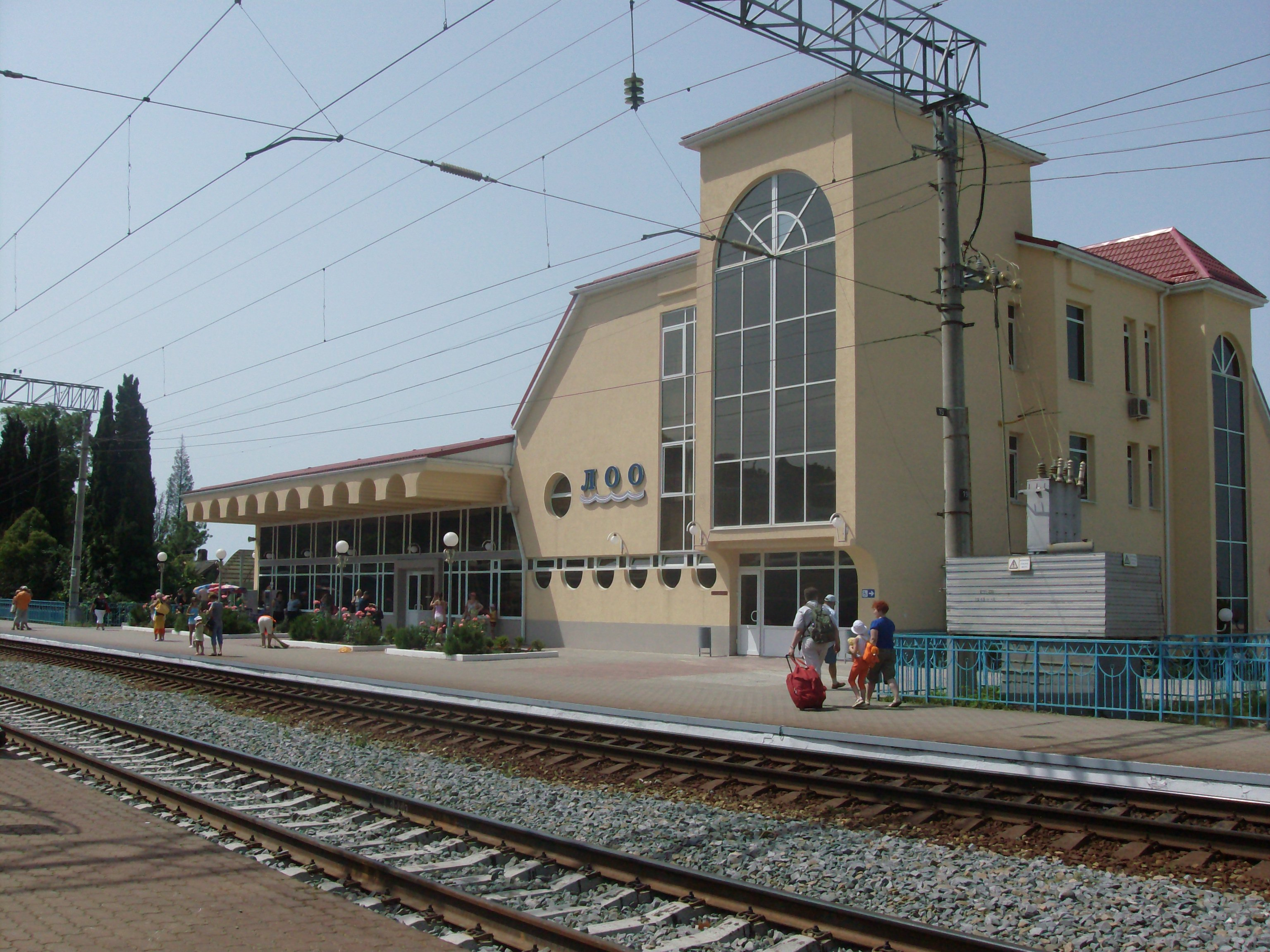 Станция Лоо, Лазаревского района города Сочи, Краснодарский край, Россия.